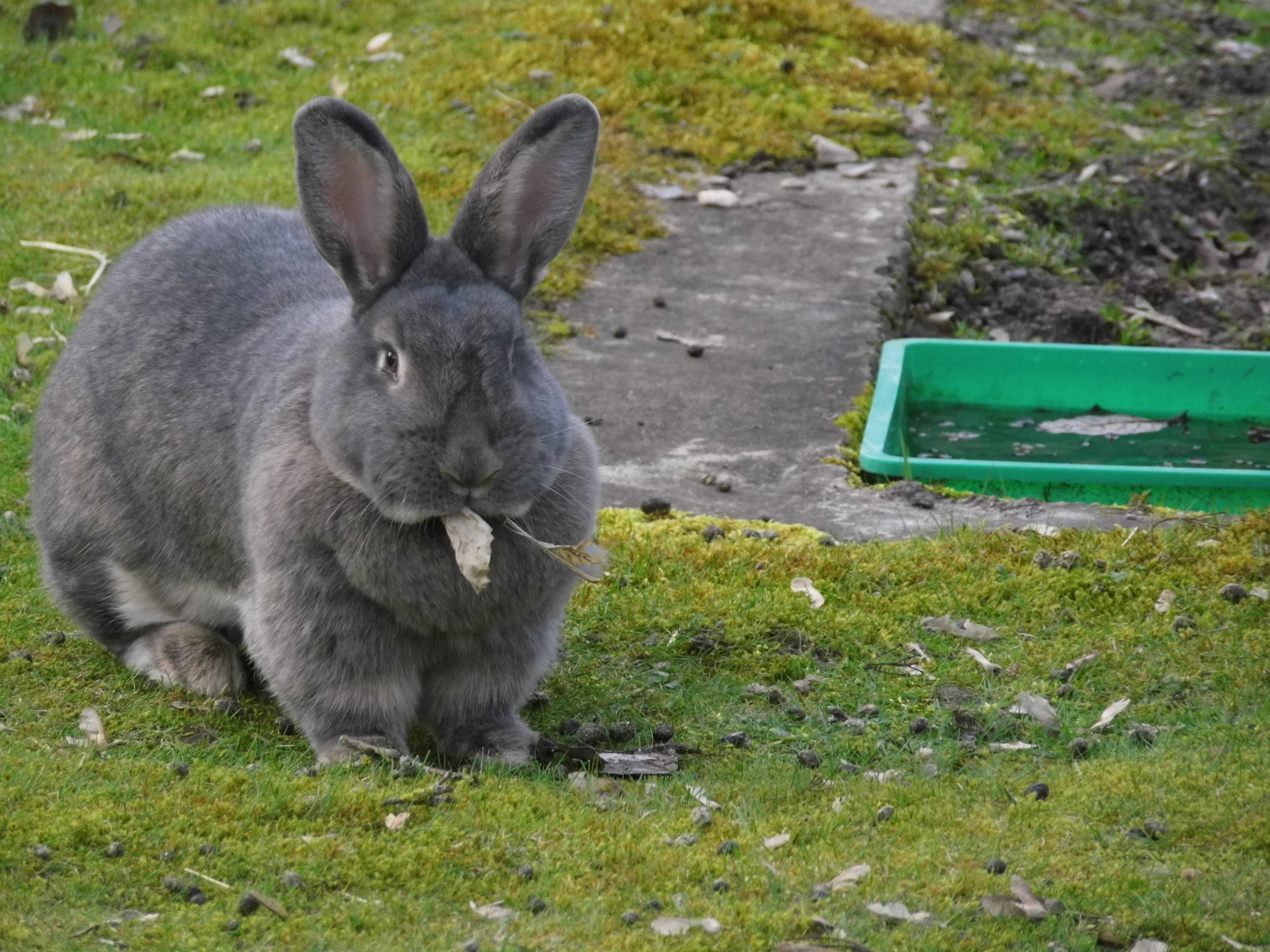 Blaugrauer Wiener beim Essen